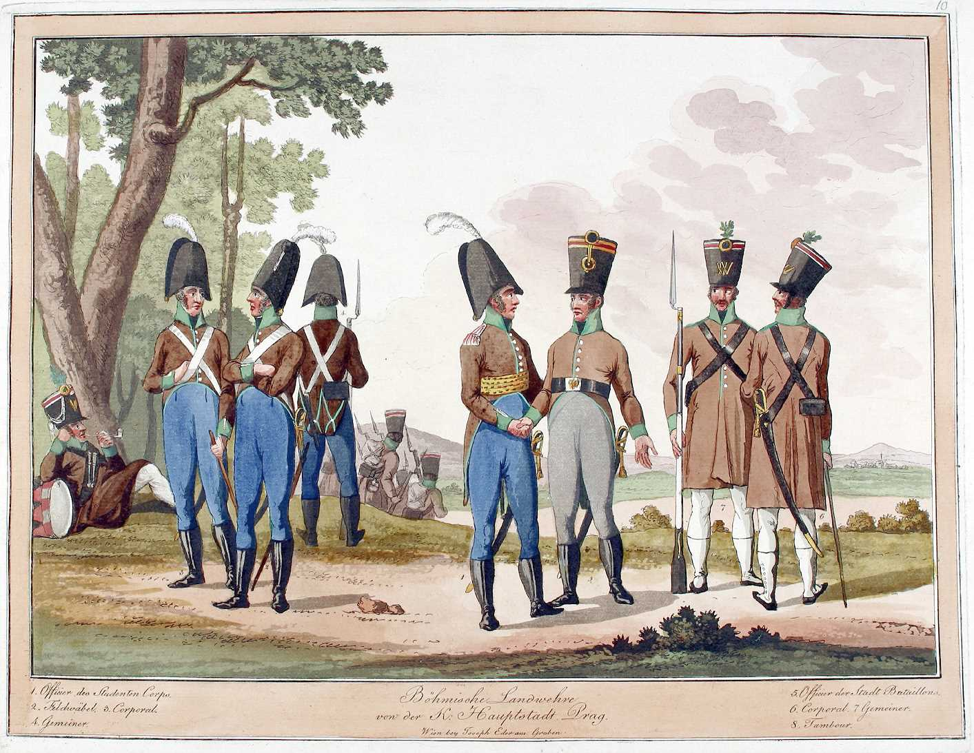 Böhmische Landwehr aus Prag